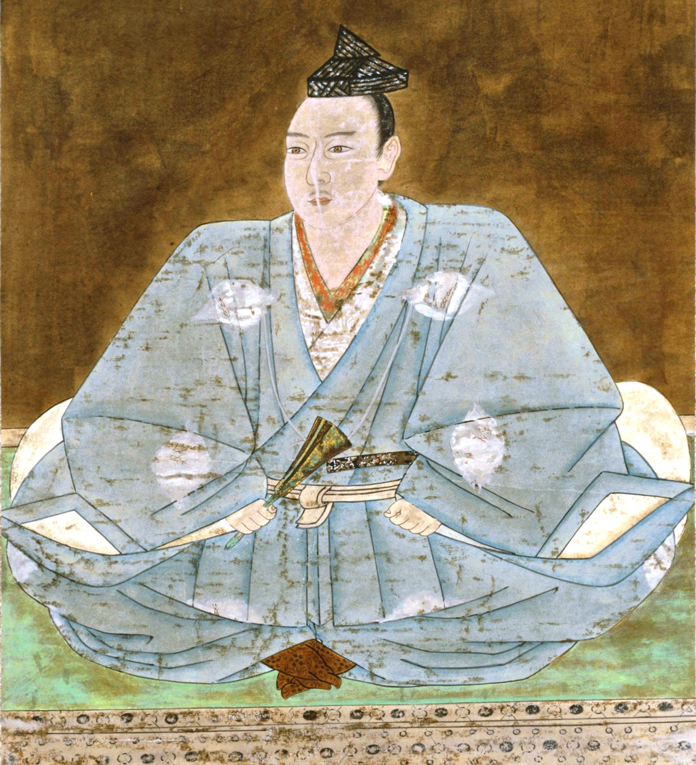 伊勢貞興の肖像。